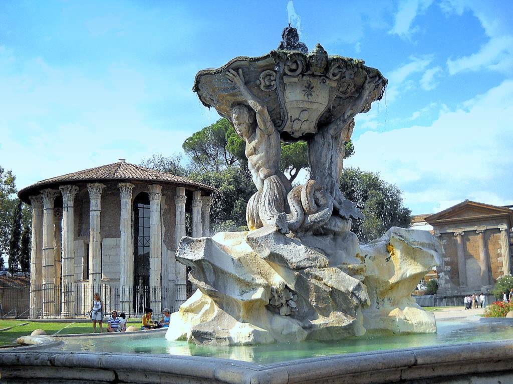 Fontana dei Tritoni Tempi di Ercole Vincitore e Portunus